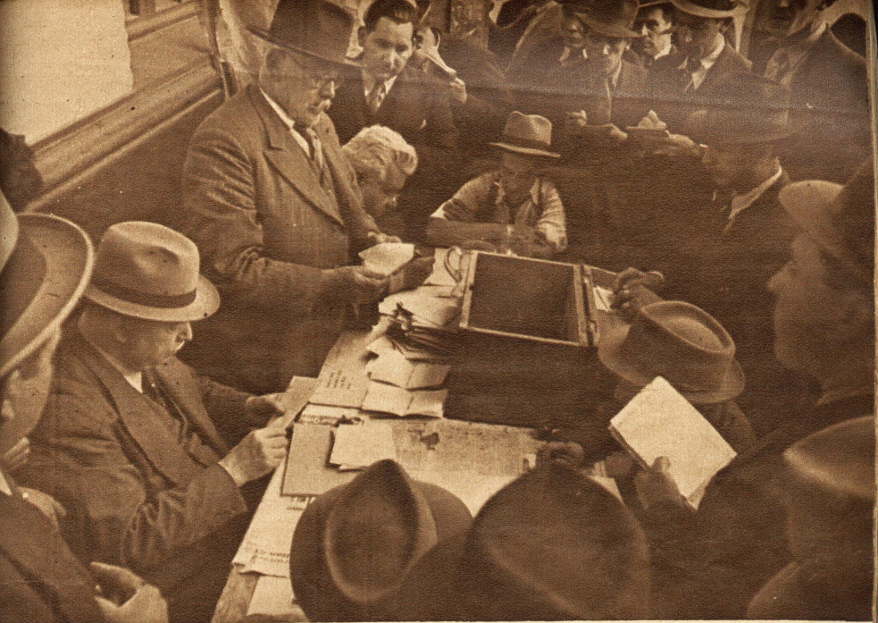 La elección presidencial de Chile de 1938 se realizó el 30 de octubre de 1938. En ella triunfó en candidato radical del Frente Popular, don Pedro Aguirre Cerda